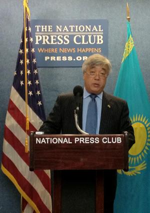 Erlan Idrissov, Qozog'istonning AQShdagi elchisi, Vashington, 21-dekabr, 2011